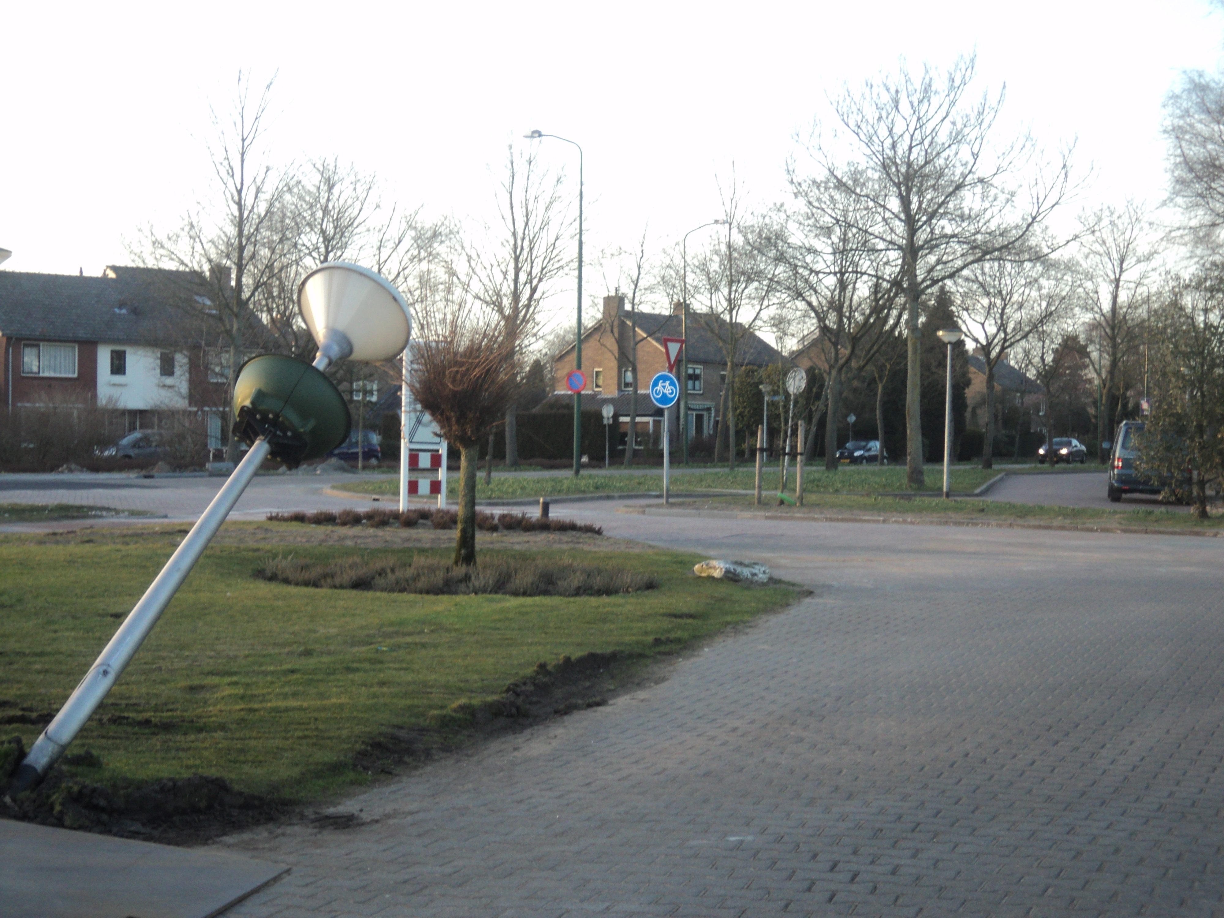 Blaricumsestraat